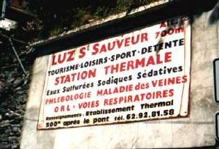 Vieux panneau signalétique des thermes de luz saint sauveur